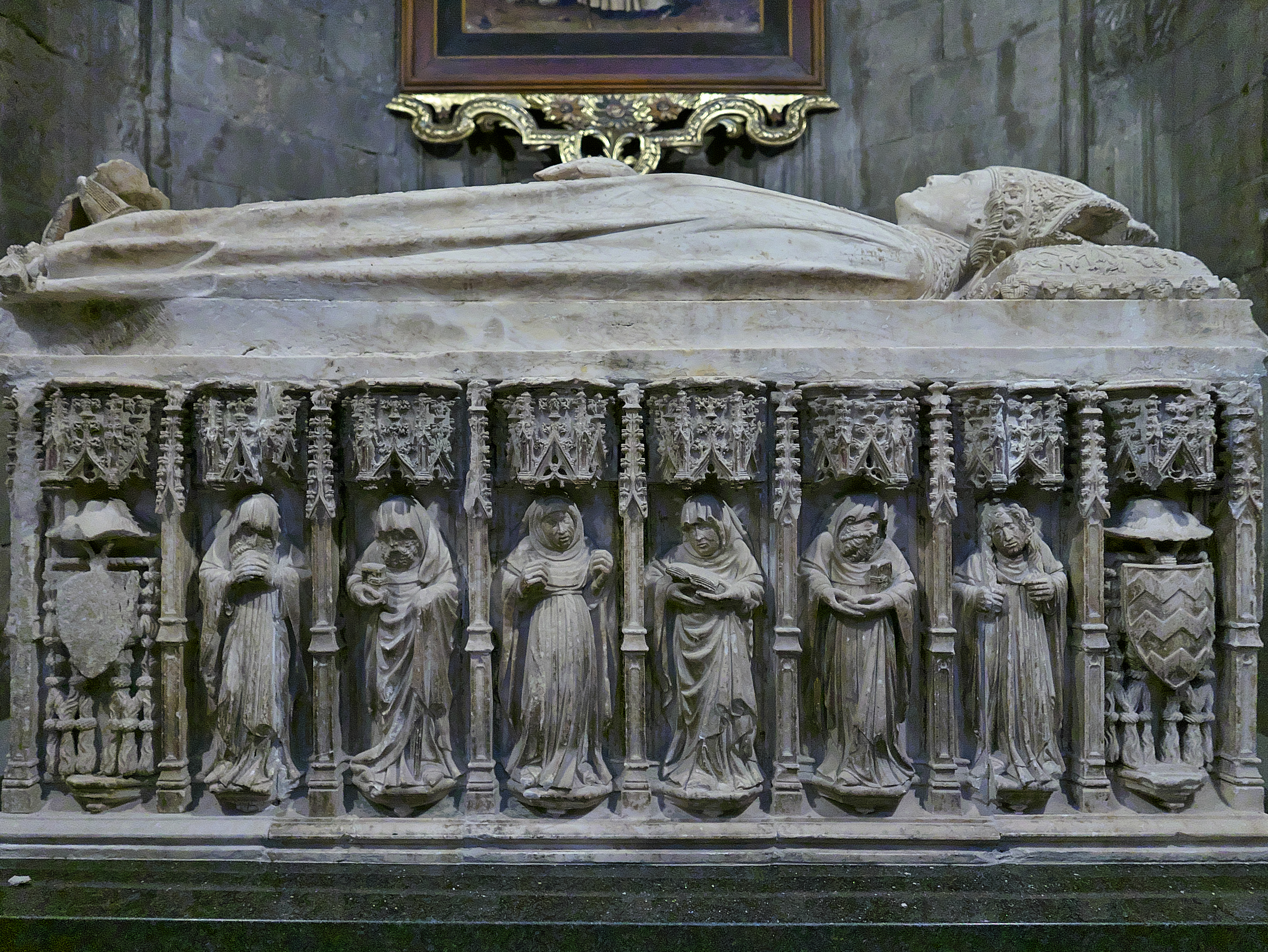 Catedral de Santa María de Gerona. Pere Oller talla el sepulcro (1411) de alabastro para el obispo Berenguer de Anglesola (†1408).